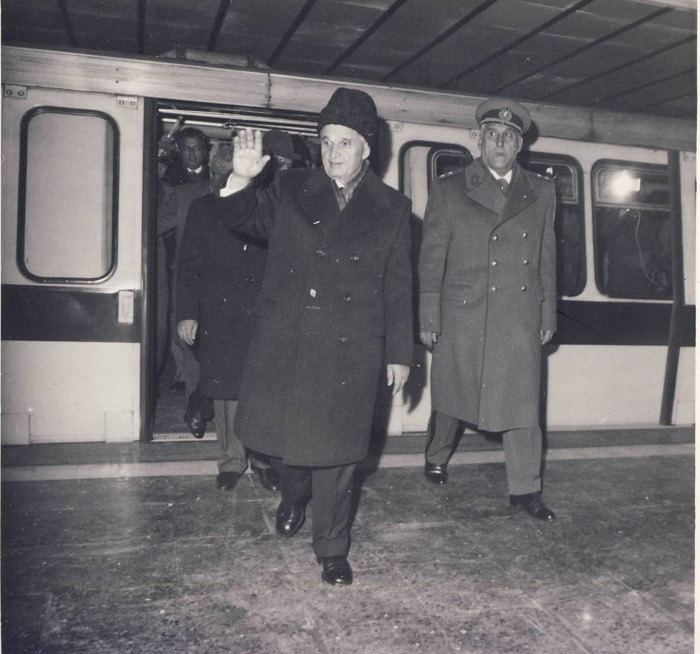 Nicolae Ceaușescu participă la la inaugurarea celui de-al doilea tronson al primei magistrale a metrou din București, pe 28 decembrie 1981.